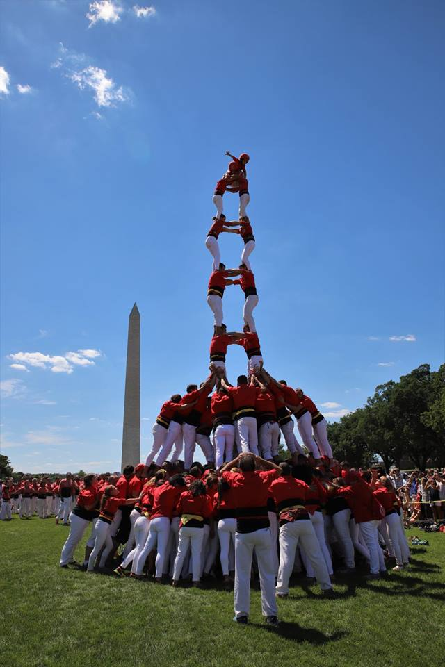 Primer castell folrat fei mai al continent americà, 9-VI-2018. Foto de; Roser Giner Rius.